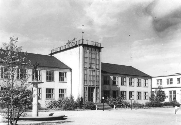 Dresden, Technische Hochschule, Institut für Schwachstromtechnik Zentralbild Repro Vgt-Noa 4.9.1959 Wiederaufbau der Stadt Dresden UBz: Technische Hochschule - Barkhausenbau, Neuererichtetes Institut für Schwachstromtechnik. Reproduktion jeder Art nur mit Genehmigung und Angabe des Urhebers gestattet - Rat der Stadt Dresden - Der Chefarchitekt Bildstelle